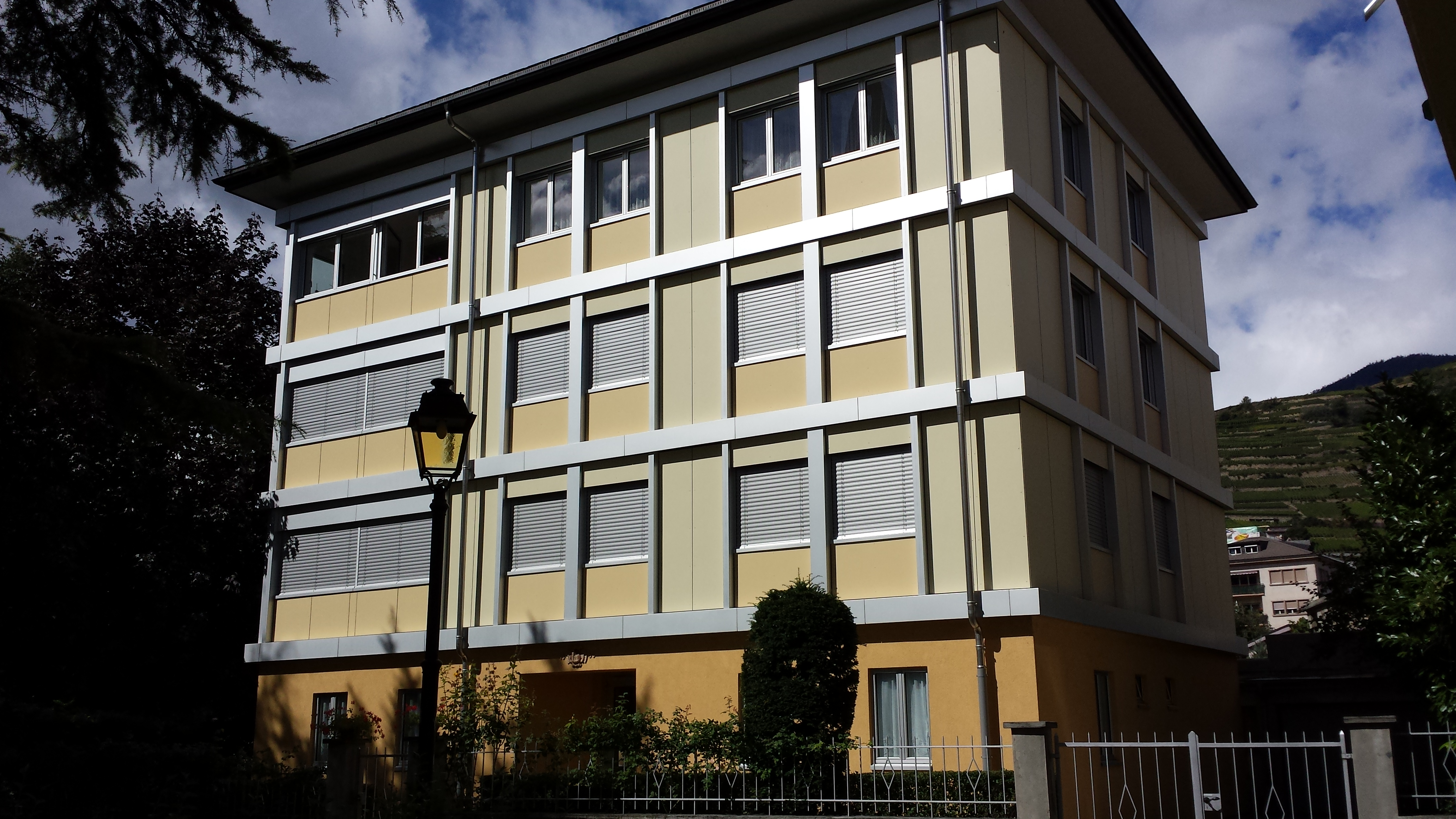 Archiv des Kapitels